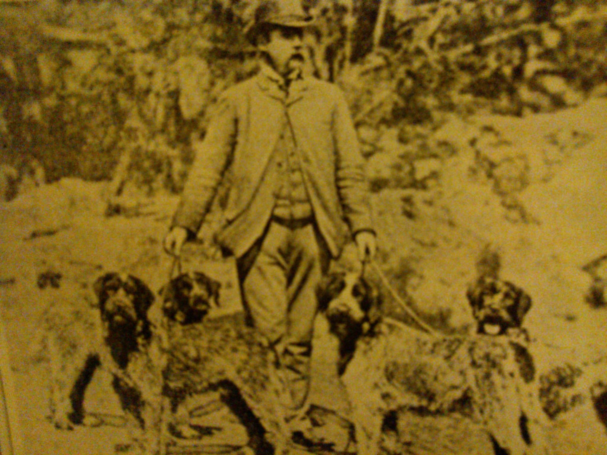 Eduard Karel Korthaals neves kutyatenyésztő